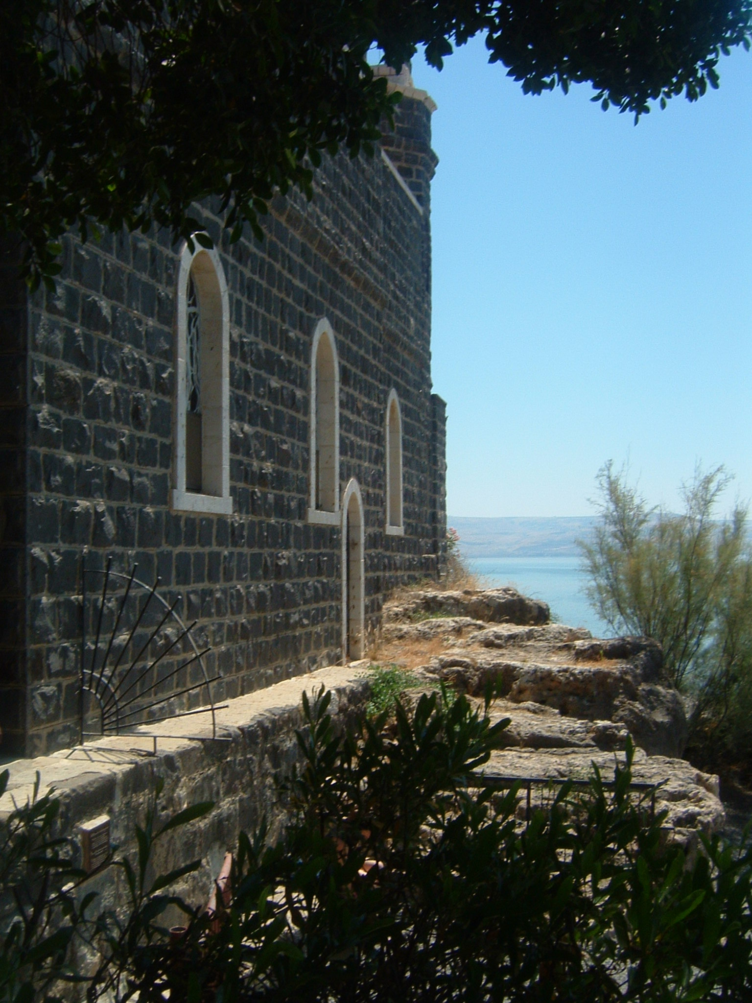 Foto scattata da me Esterno della chiesa del primato di Pietro a Tabga e resti di una scalinata risalente al periodo romano, descritta dalla pellegrina Egeria nel suo resoconto di viaggio